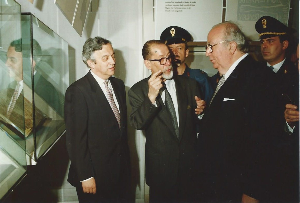 Nenuille opera propria